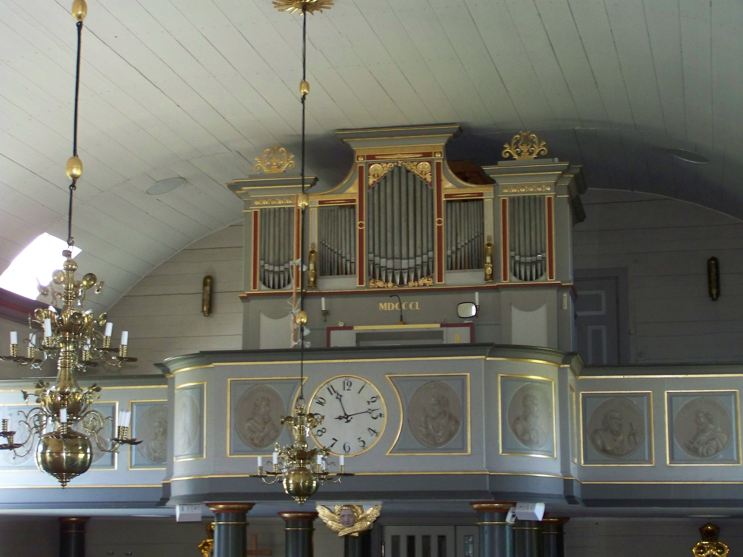 In Kallinge, Schweden. Härlunda Kirche